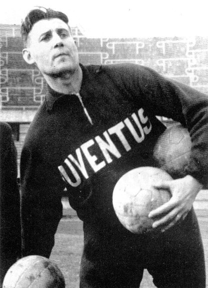 György Sárosi - Juventus FC (1951 - 1953) - l'allenatore di calcio ed ex calciatore ungherese György Sárosi alla guida della Juventus nella prima metà degli anni 50 del XX secolo, durante una sessione di allenamento allo stadio Comunale di Torino.